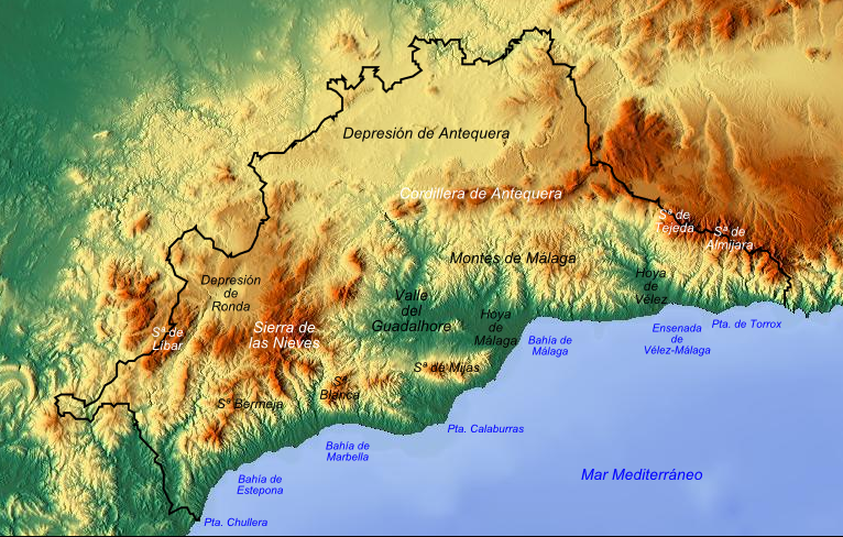 Mapa topográfico de la provincia de Málaga